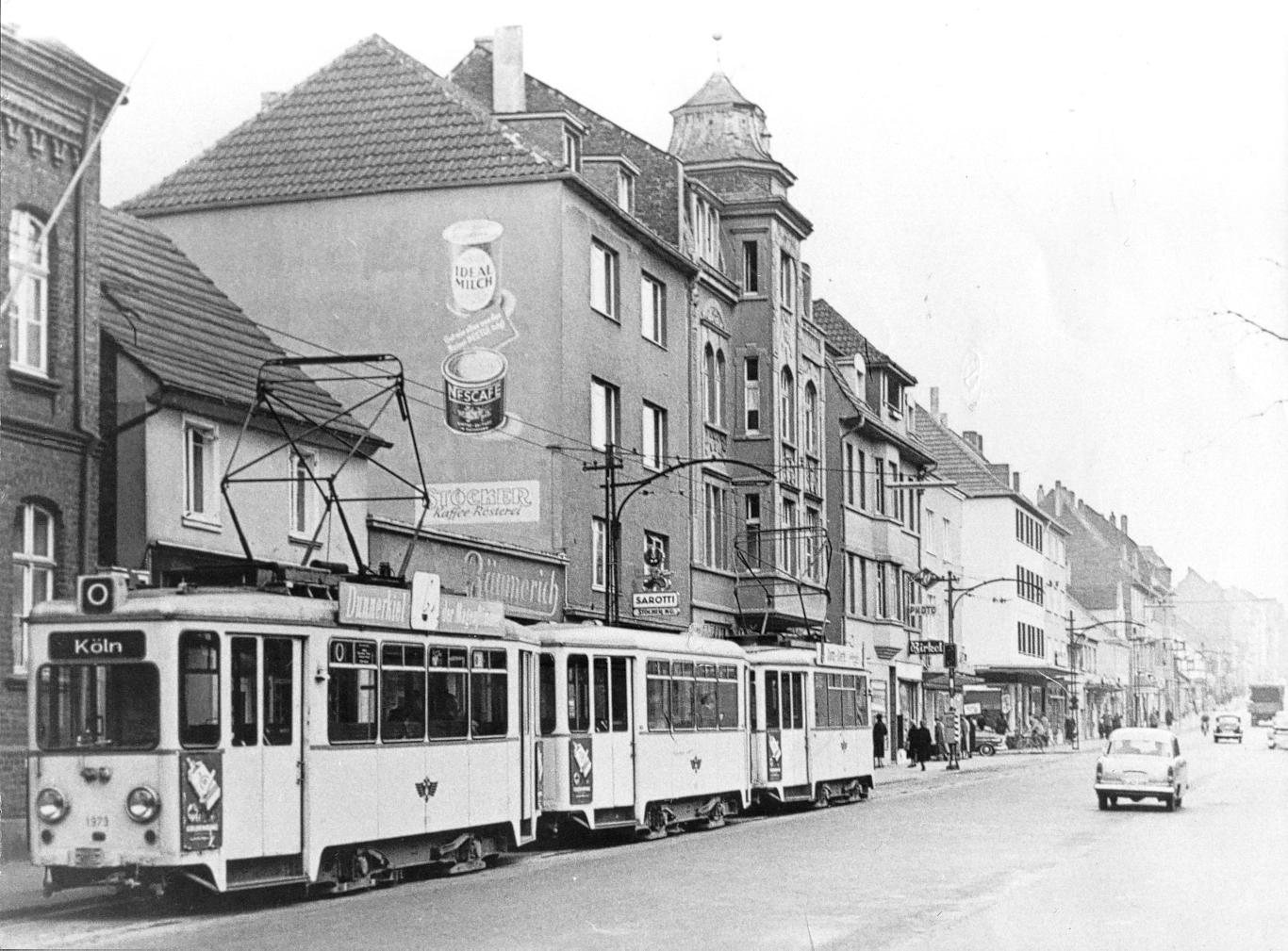 Endstelle der Linie O in Opladen1957